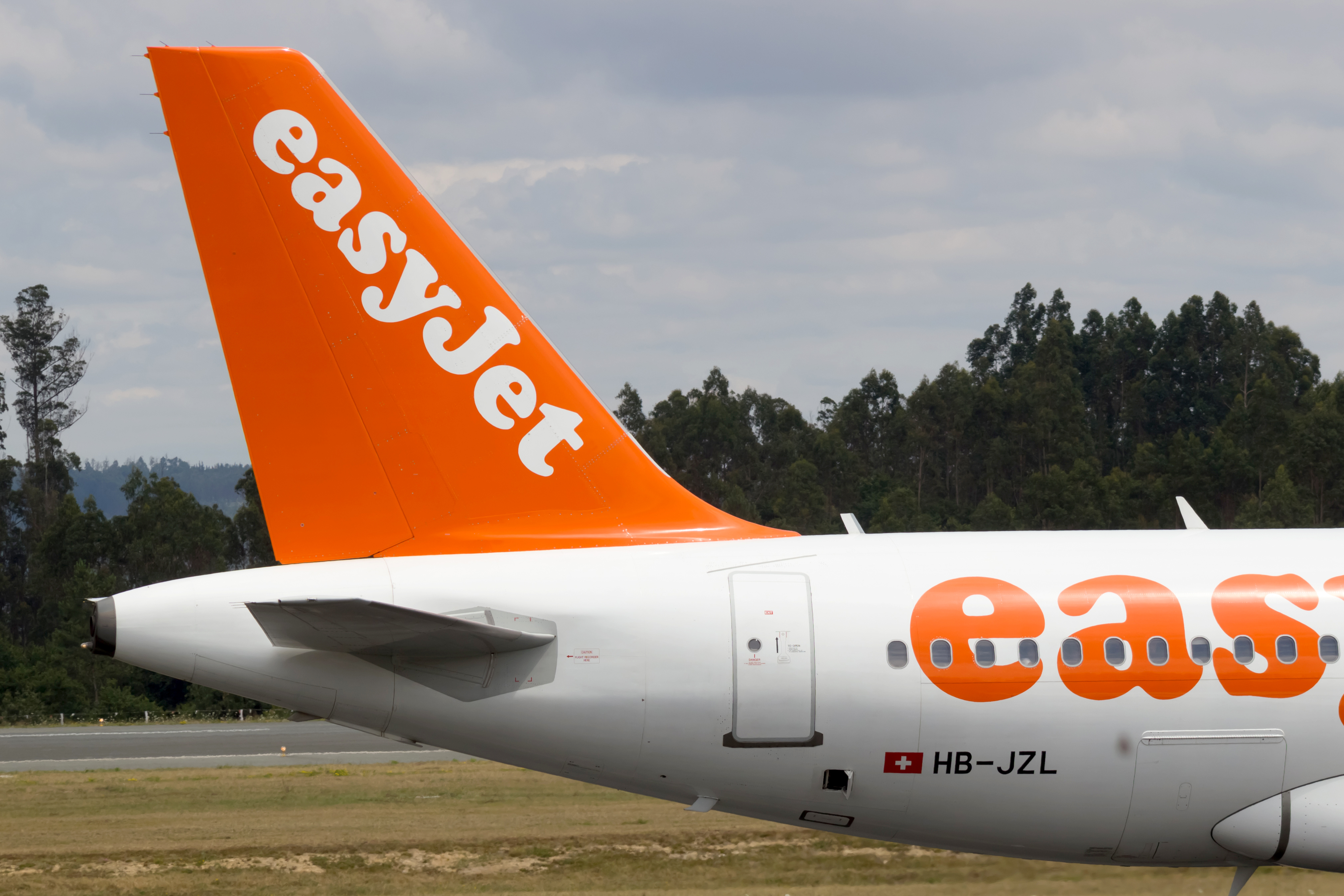 Cola dun Airbus A319 de easyJet Switerland no aeroporto de Santiago de Compostela.